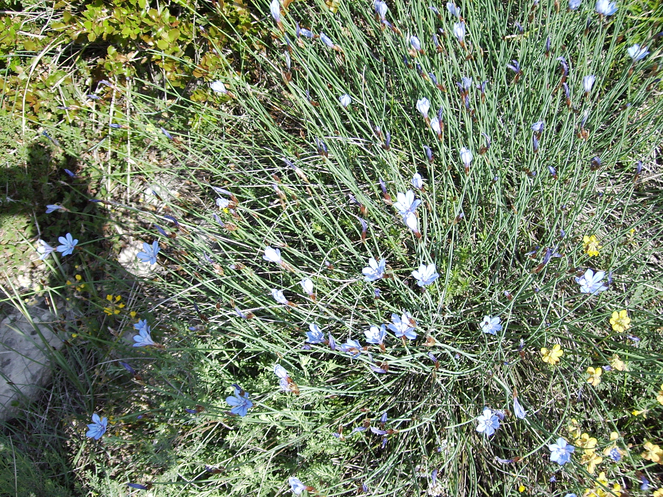 Image:Jonça_12_maig__2006_046.jpg Jonceda de castelltallat d'Aphyllanthes monspeliensis L.